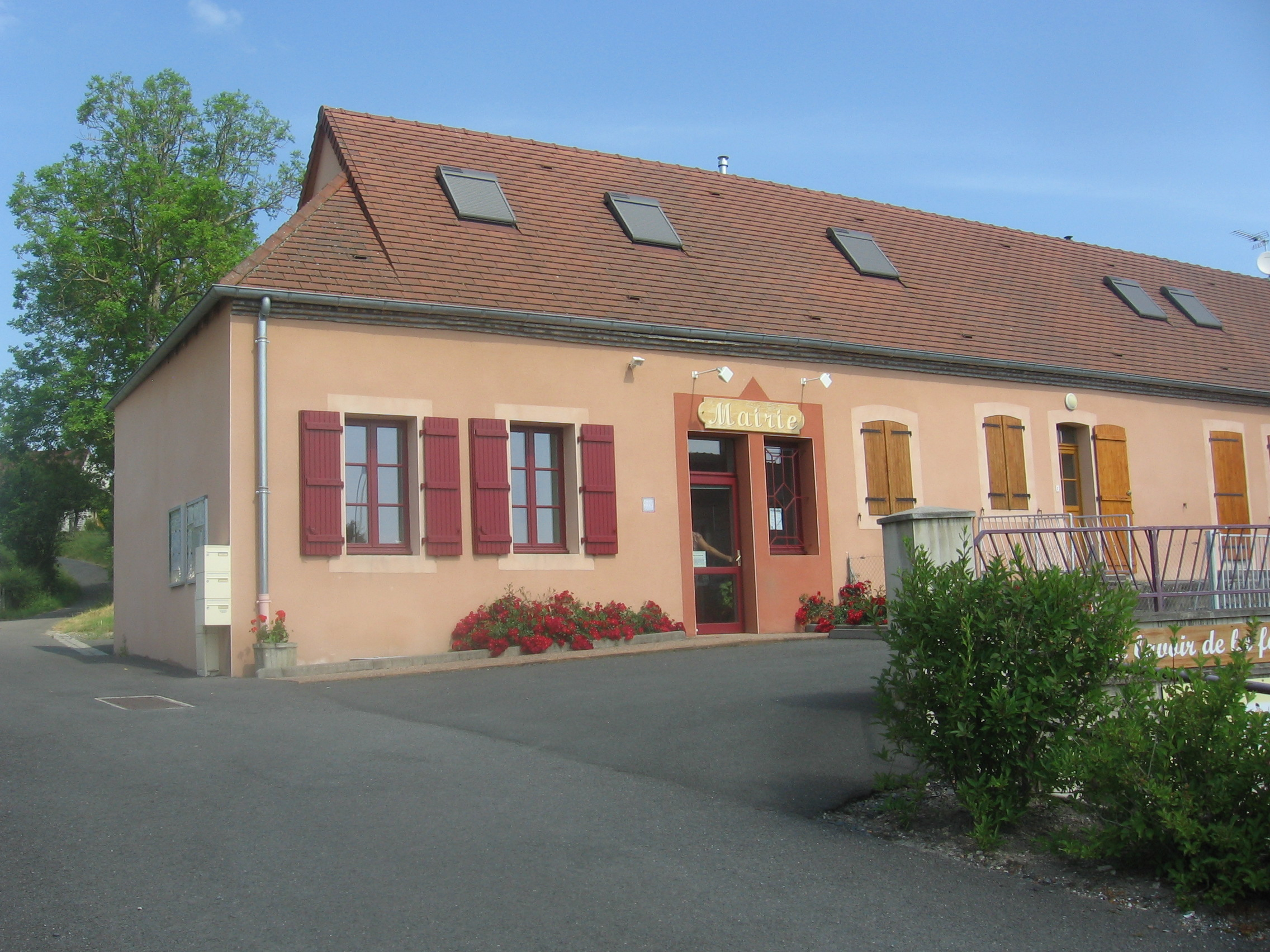 La mairie vous accueille les mardi et jeudi de 9h à 12h et de 14h30 à 17h, et le samedi de 9h à 12h.